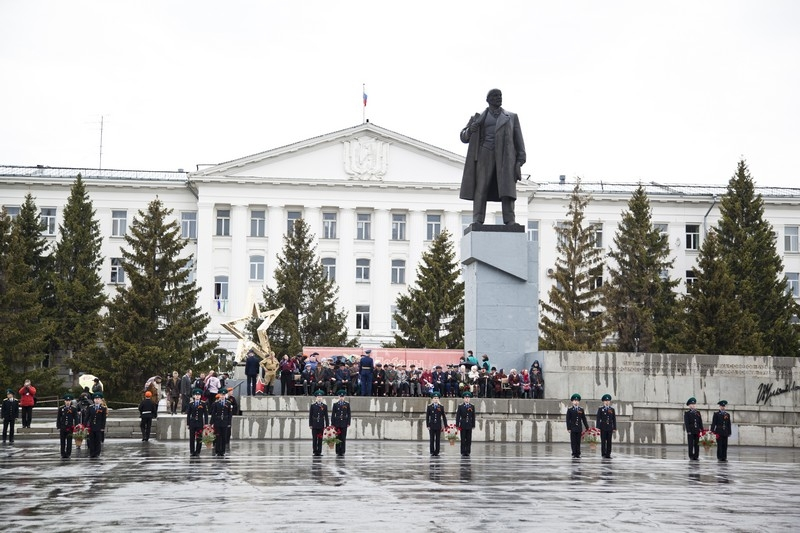 Kurgan.Pro